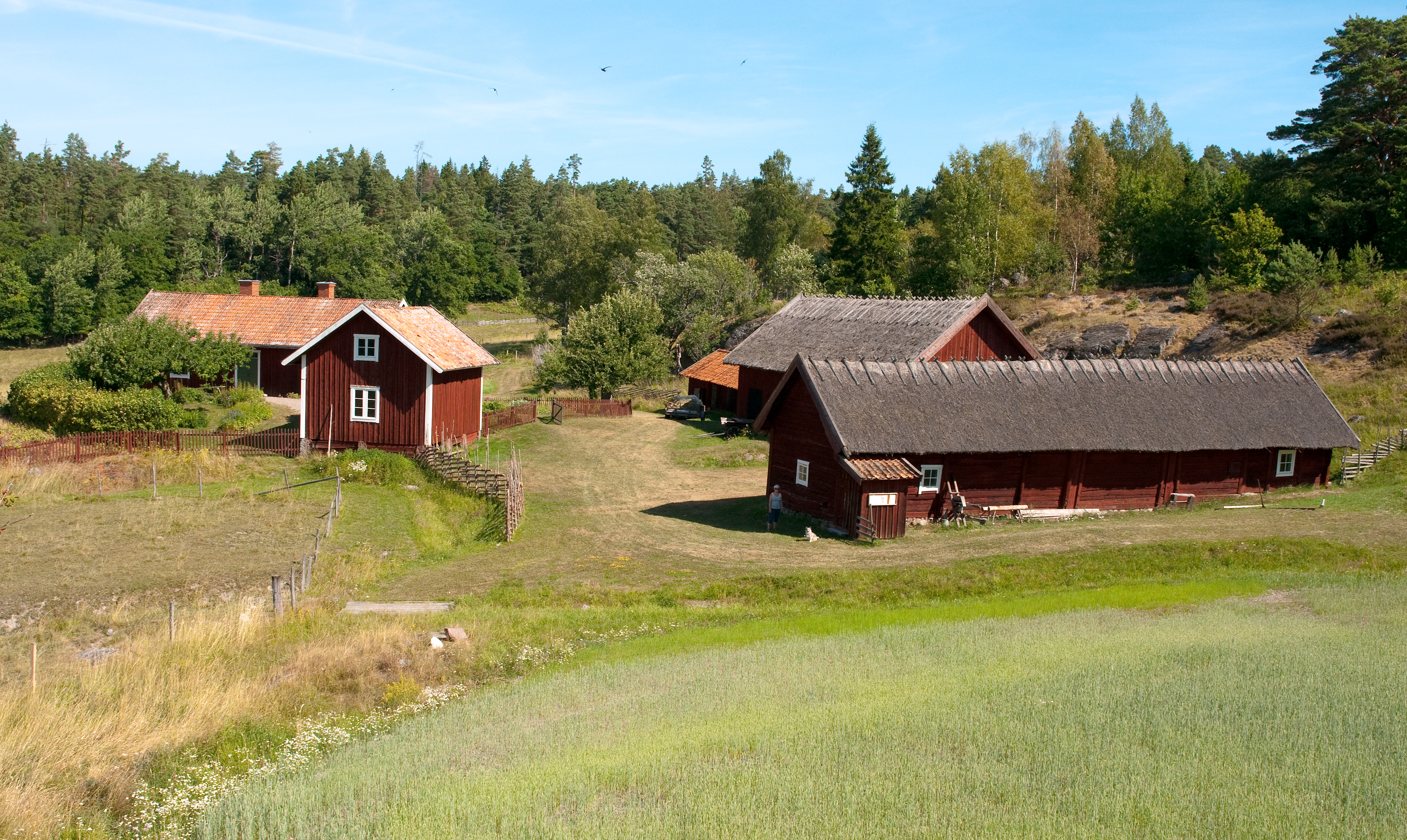 Långmarens museigård i Tystberga